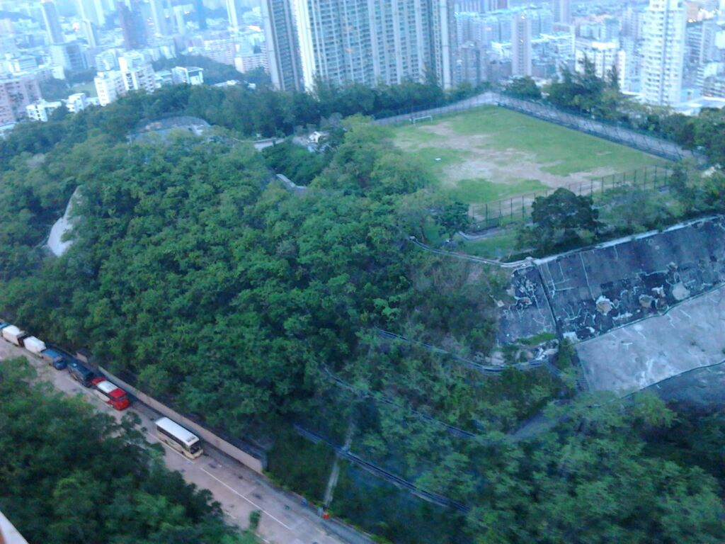 紅燈山是香港一個小山峰，高約106.8米，位於何文田和土瓜灣之間，即昔日「採石山」的東部。